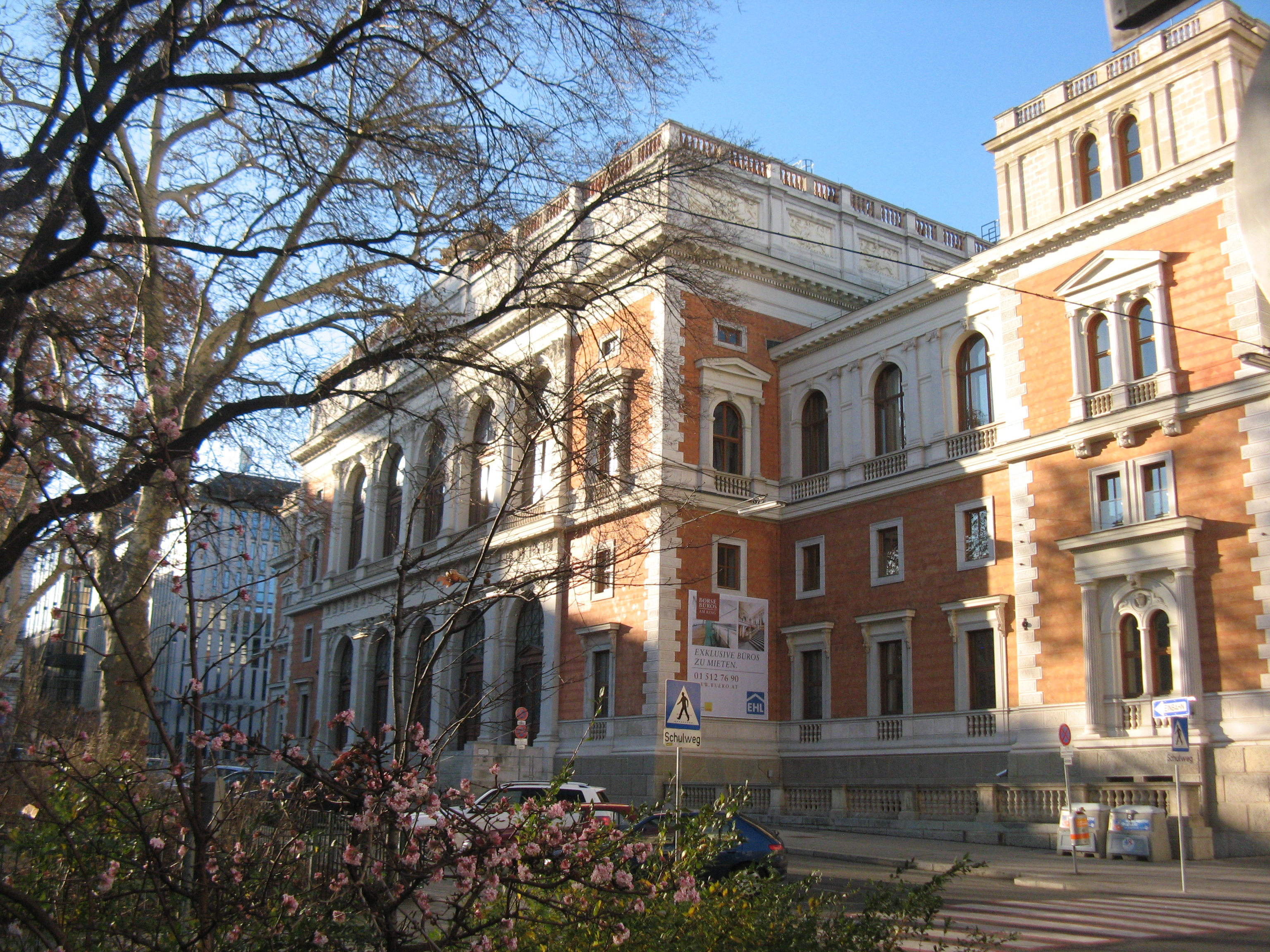 Börse, Börseplatz 2, Wien-Innere Stadt